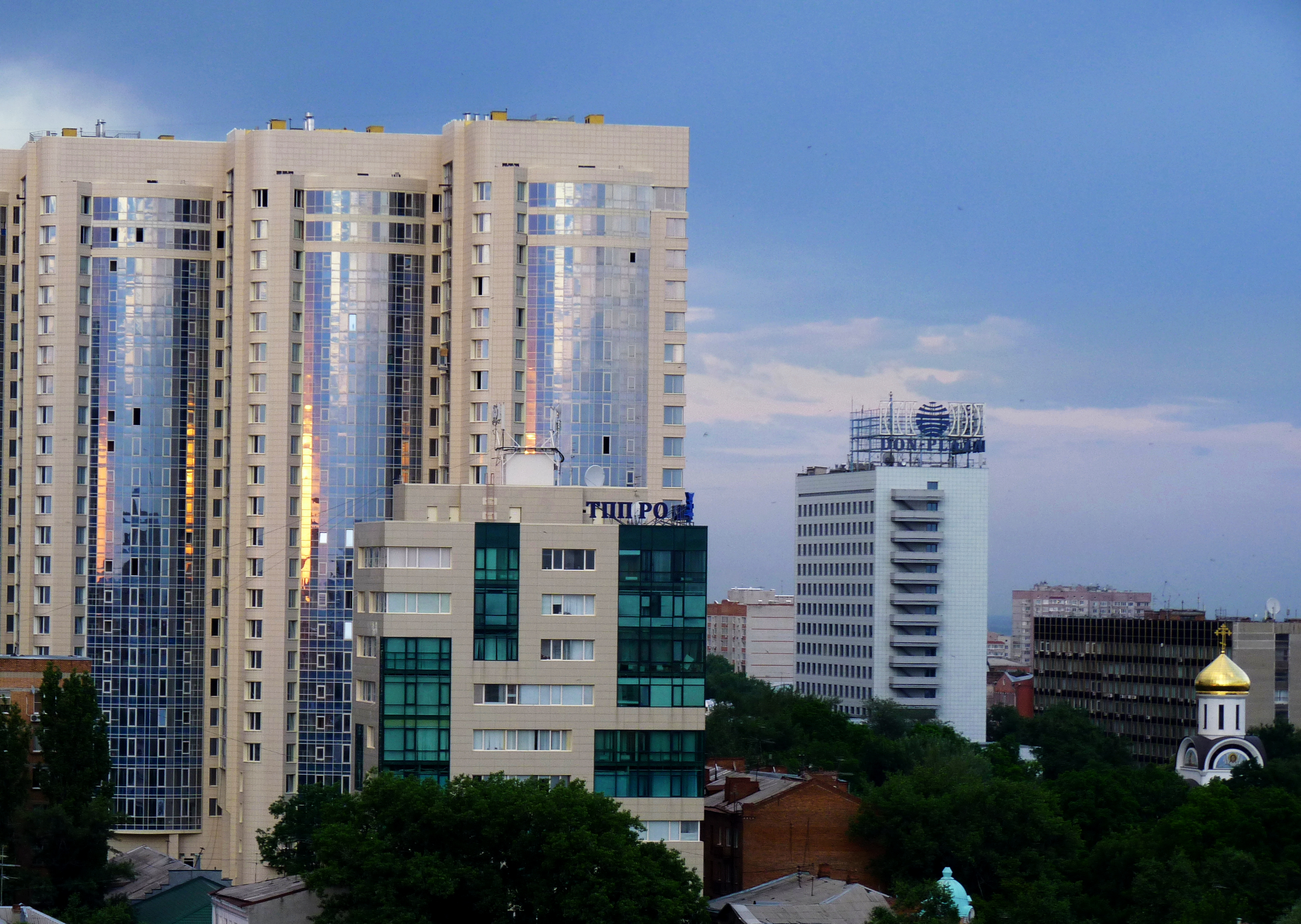 Ростов-на-Дону